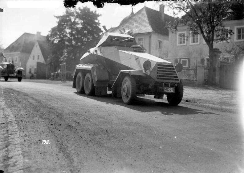 Herbstmanöver des IX. Armeekorps in der Bayrischen Ostmark 1935,Panzer-Spähwagen Information added by Wikimedia users.schwerer Panzerspähwagen (Pz.Spw. (6 Rad) (Sd.Kfz. 231)